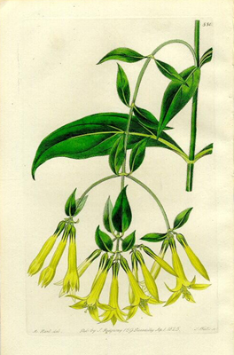 Lisianthius longifolius